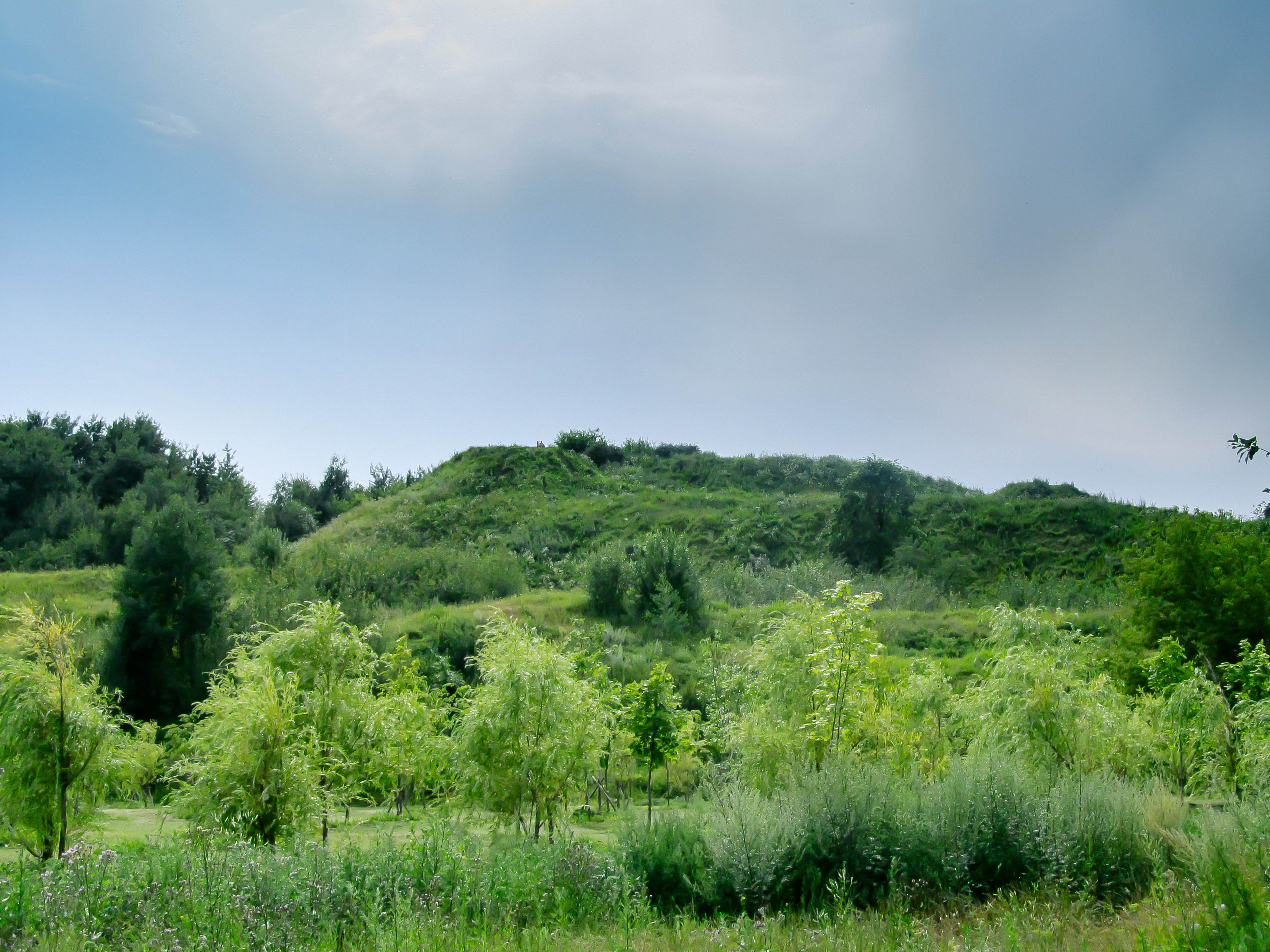 Дьяково городище в Коломенском